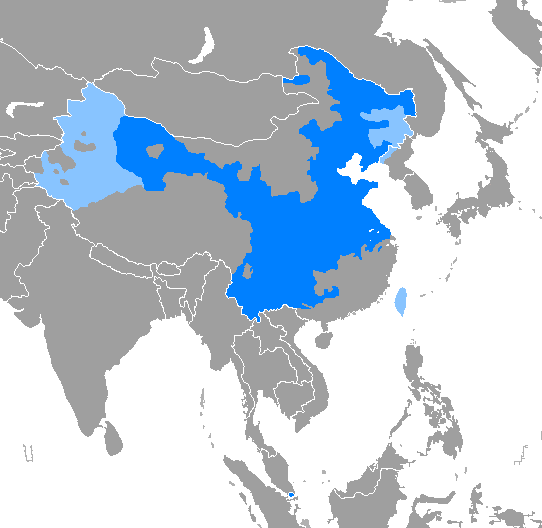 Idioma mandarín